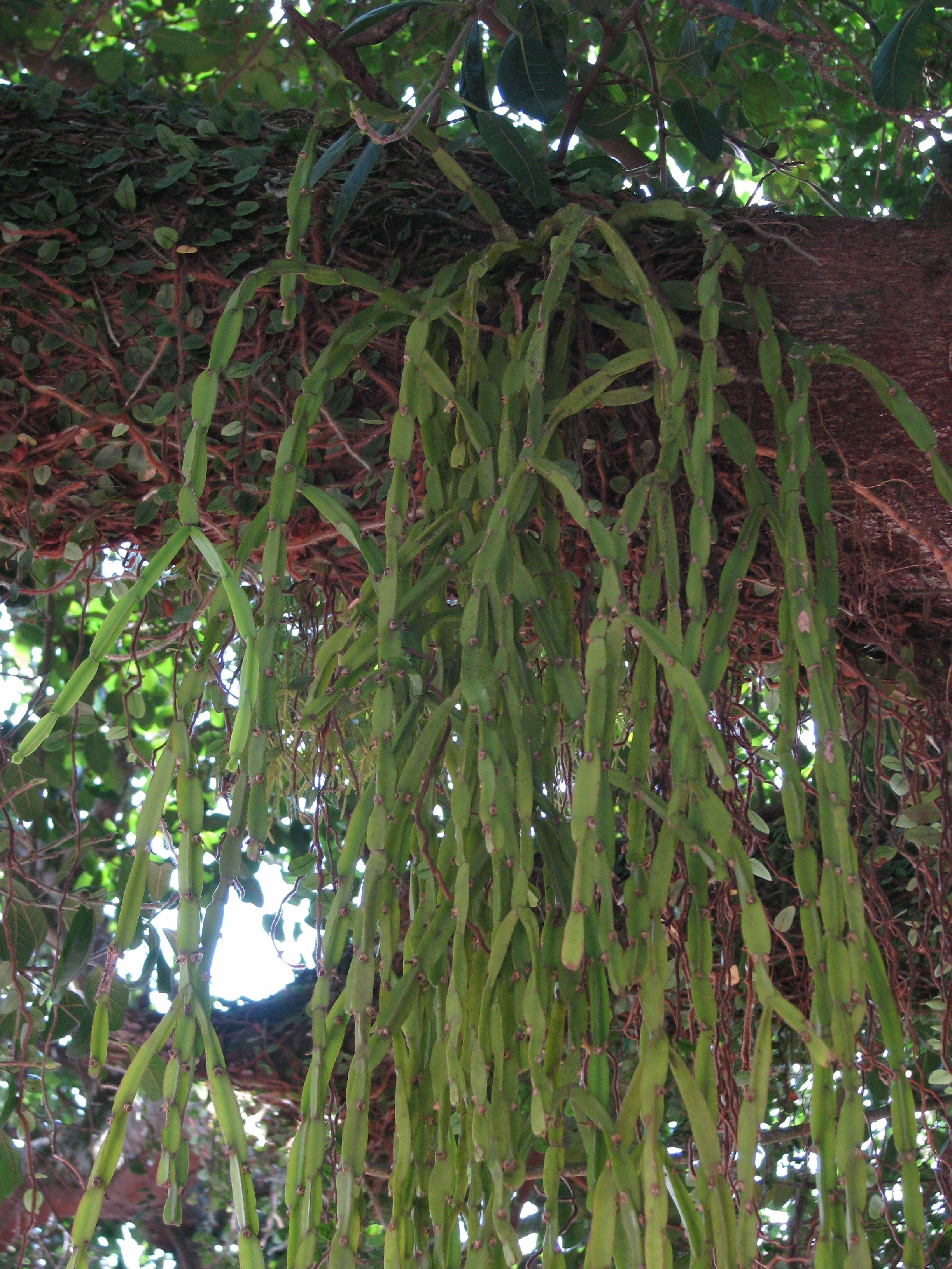 Foto de Rhipsalis paradoxa, vegetando sobre uma árvore.